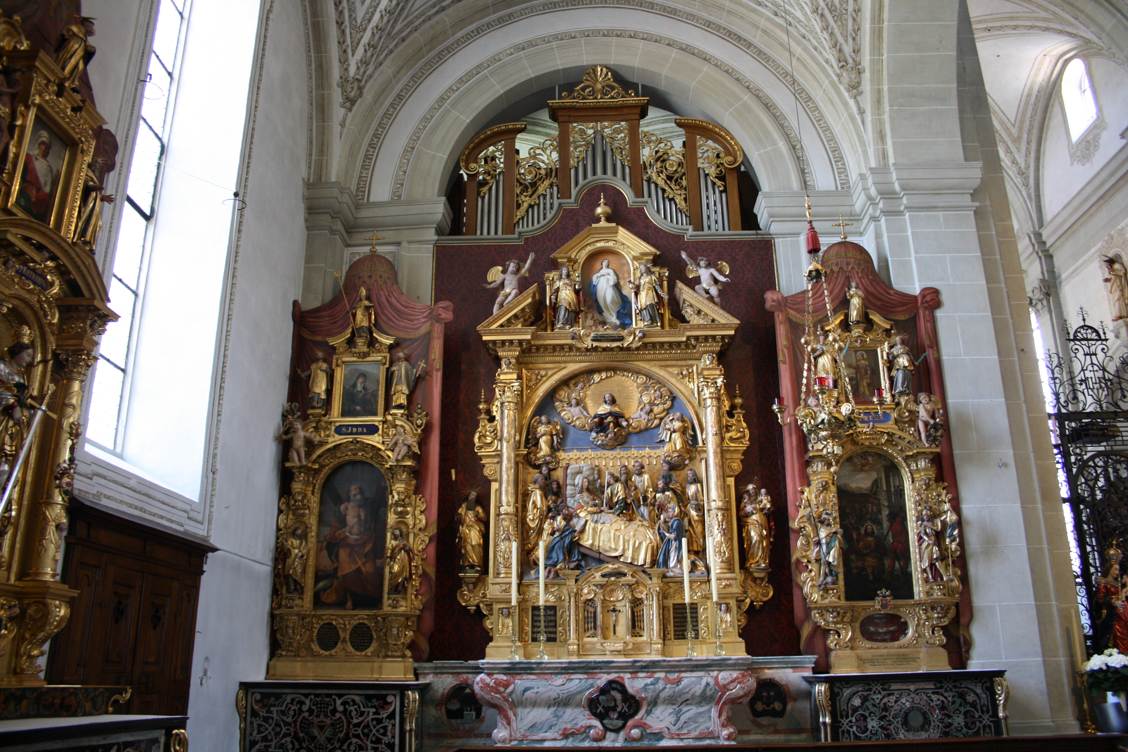 Andreasaltar, Mariä-End-Altar, Mauritiusaltar (Niklaus Geisler, ca. 1640; Mittelstück: Jörg Wild, ca. 1500)